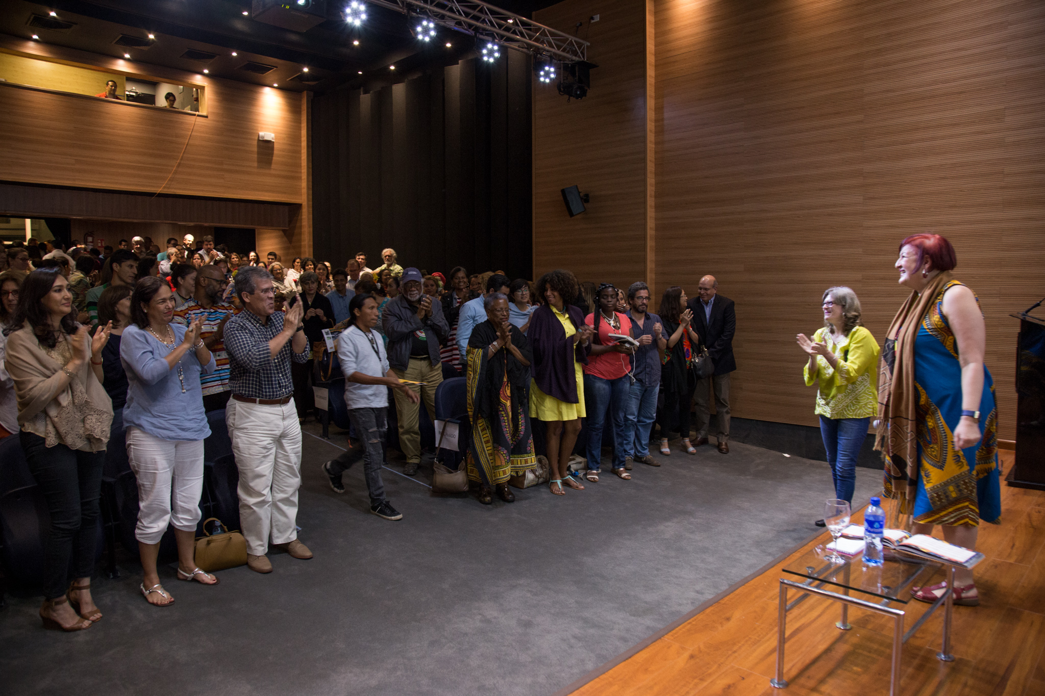 Conferencia de Diana Uribe en evento África en América en Panamá.